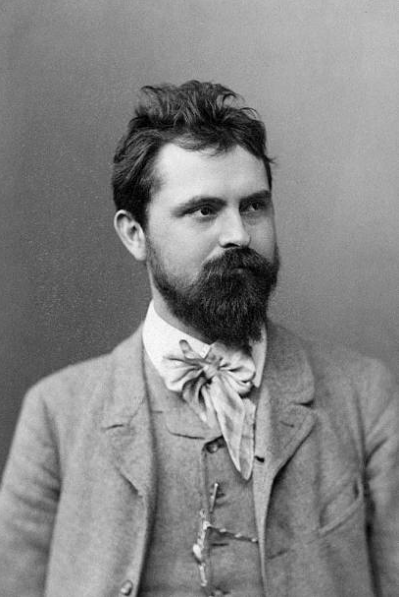 Portrait des Bildhauers Robert Baerwald, c. 1890